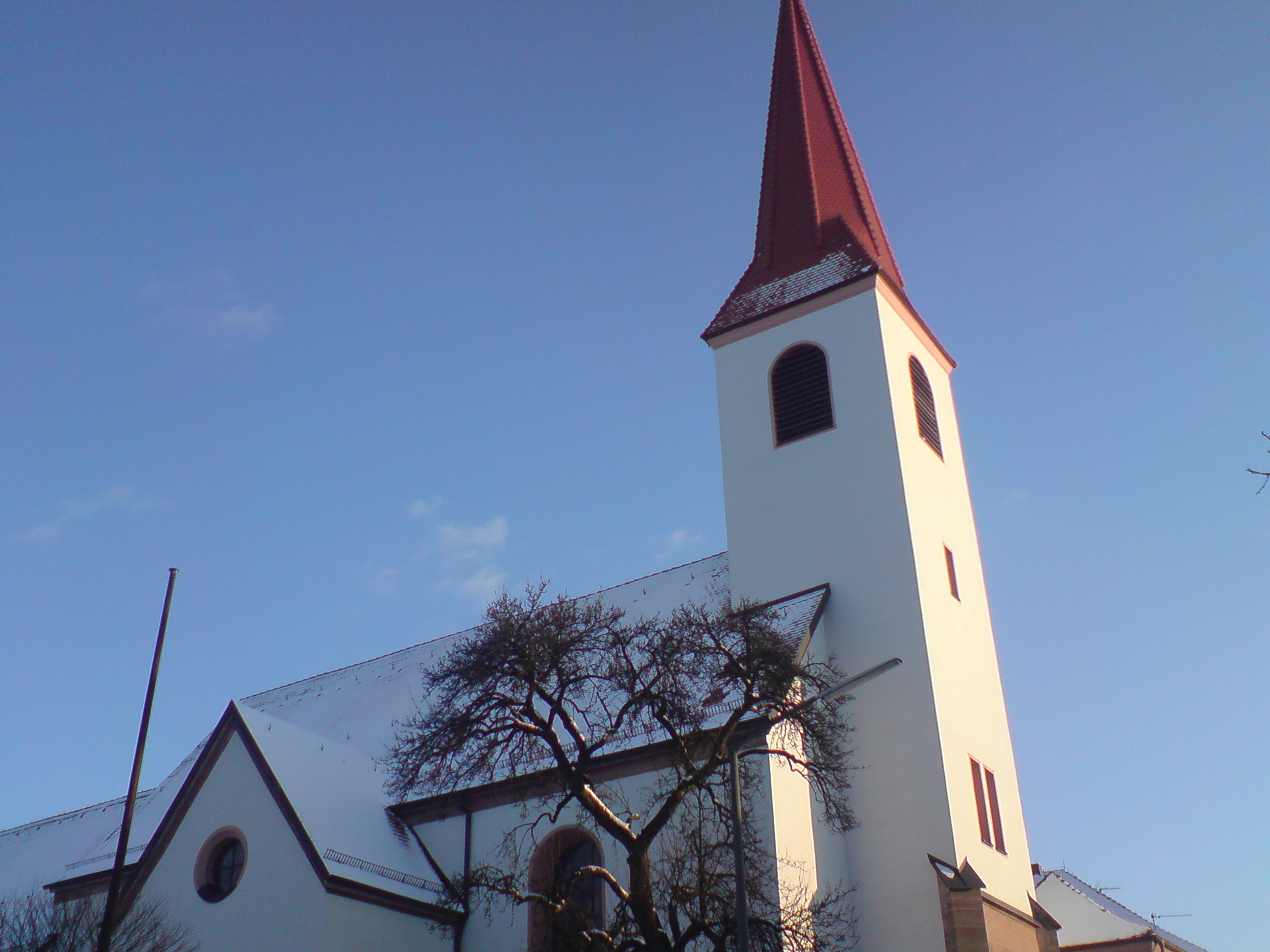 Ev. Kirche Neumarkt